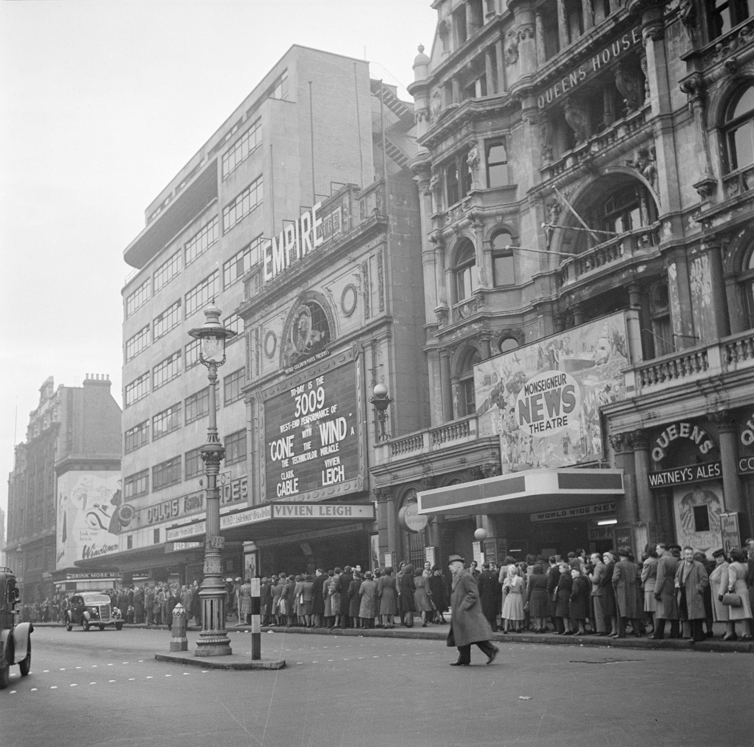 Collectie / Archief : Fotocollectie Van de Poll Reportage / Serie : Reportage Londen Beschrijving : In de rij voor de Empire bioscoop met een voorstelling van Gone with the Wind Datum : 1947 Locatie : Groot-Brittannië, Londen Trefwoorden : bioscopen, straatbeelden Fotograaf : Poll, Willem van de Auteursrechthebbende : Nationaal Archief Materiaalsoort : Negatief (6x6) Nummer archiefinventaris : bekijk toegang 2.24.14.02 Bestanddeelnummer : 254-1973